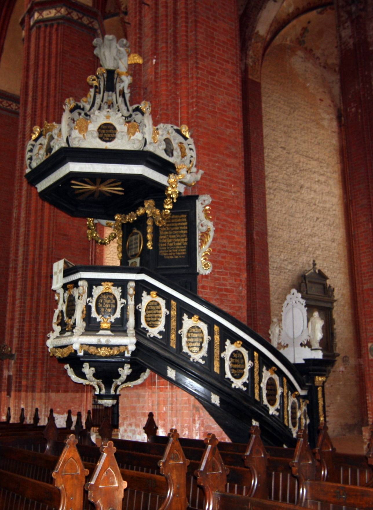 Kanzel